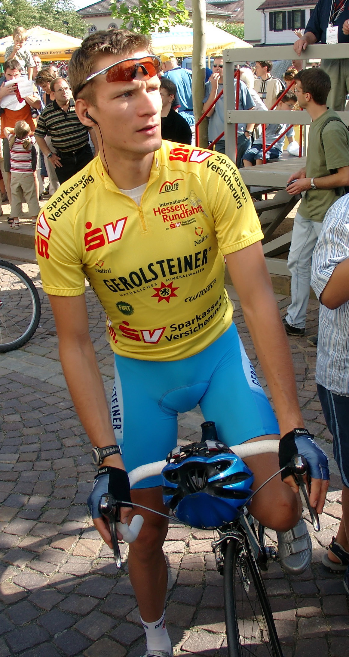 Sebastian Lang at race in Germany